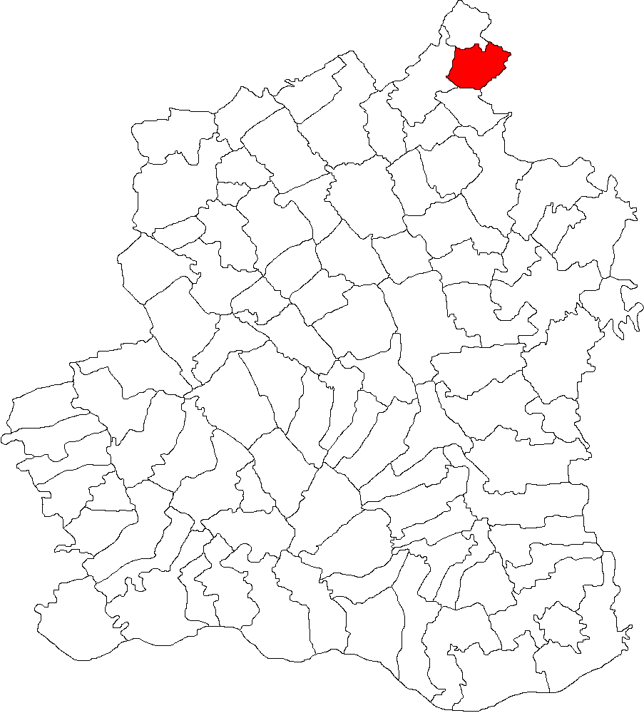 Categorie:Hărţi ale judeţului Teleorman